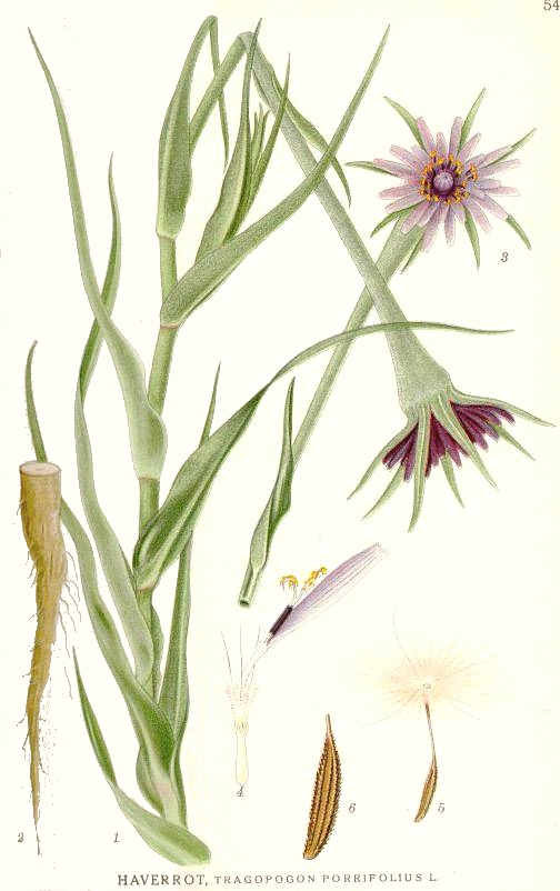 Original Description Haverrot, Tragopogon porrifolius L.